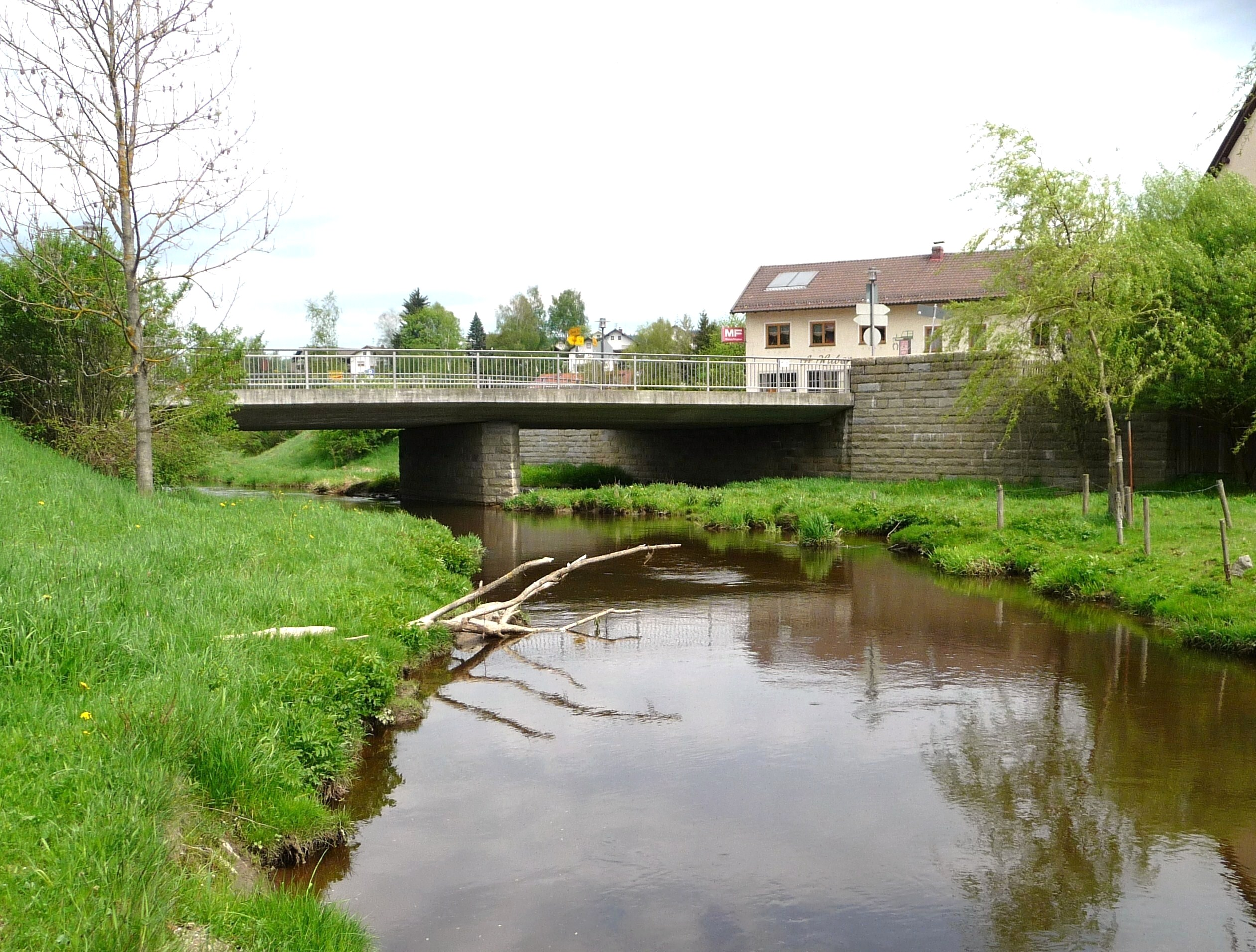 Die Rinchnacher Ohe vor der Brücke in Rinchnach